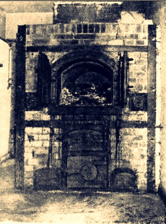 Uniwersytet Rzeszy w Poznaniu - krematorium w którym palono zwłoki zamordowanych Polaków (Collegium Anatomicum Akademii Medycznej im. Karola Marcinkowskiego w Poznaniu)